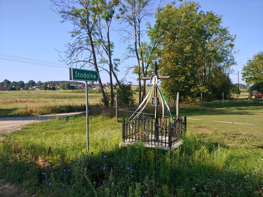 Kapliczka przed wjazdem na Stodolne